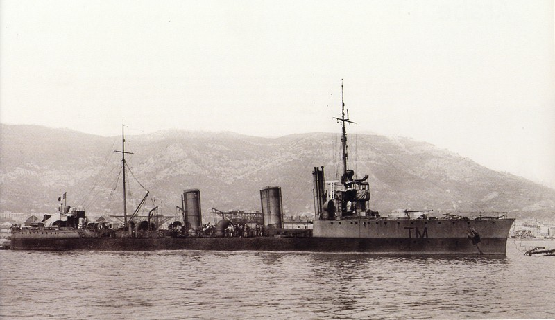 Contre-torpilleur Temeraire (Classe Aventurier)